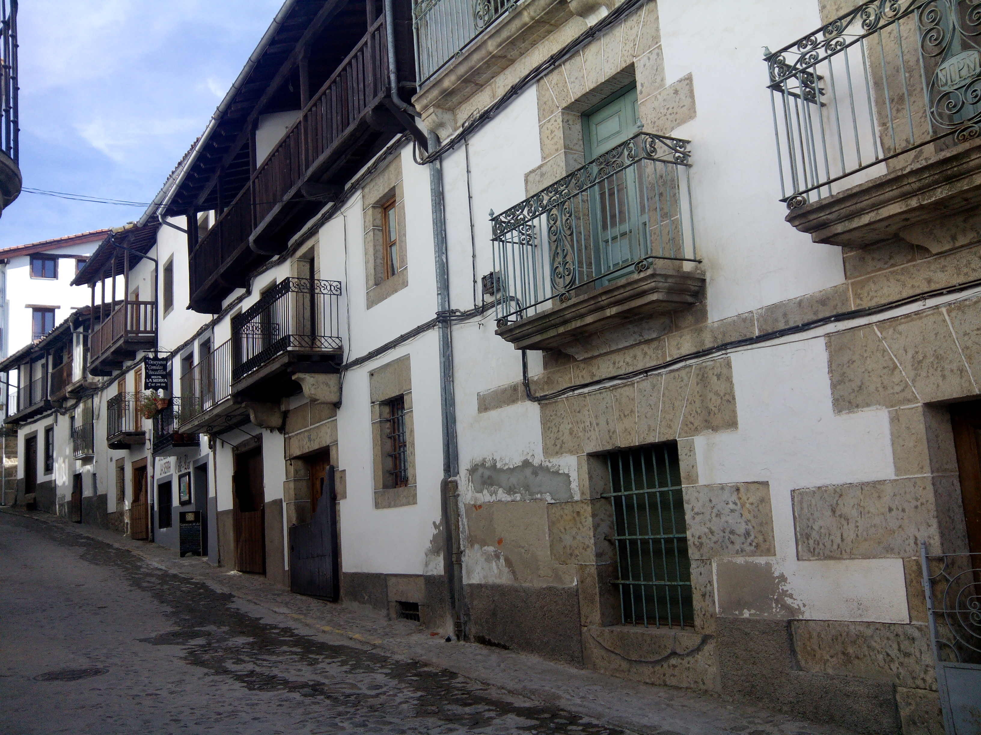 Arquitectura tradicional de Candelario (IV)